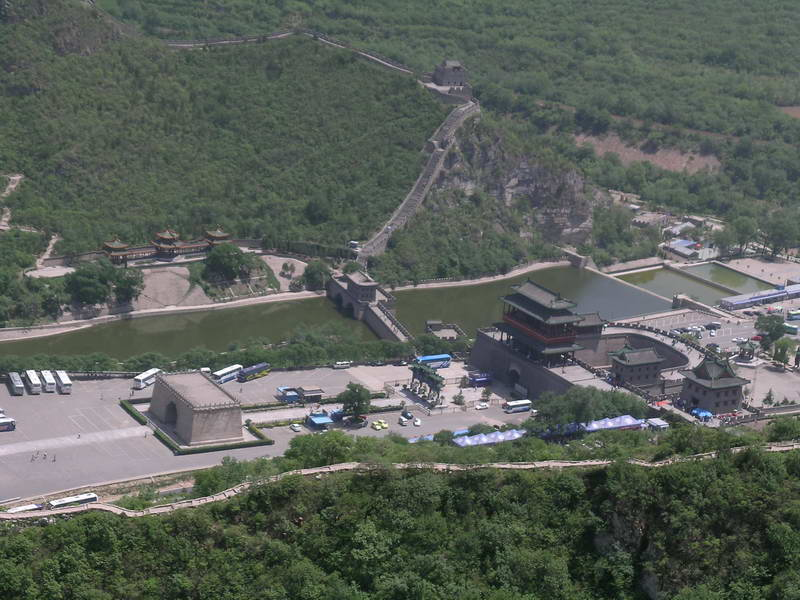 居庸关(Juyongguan Pass)